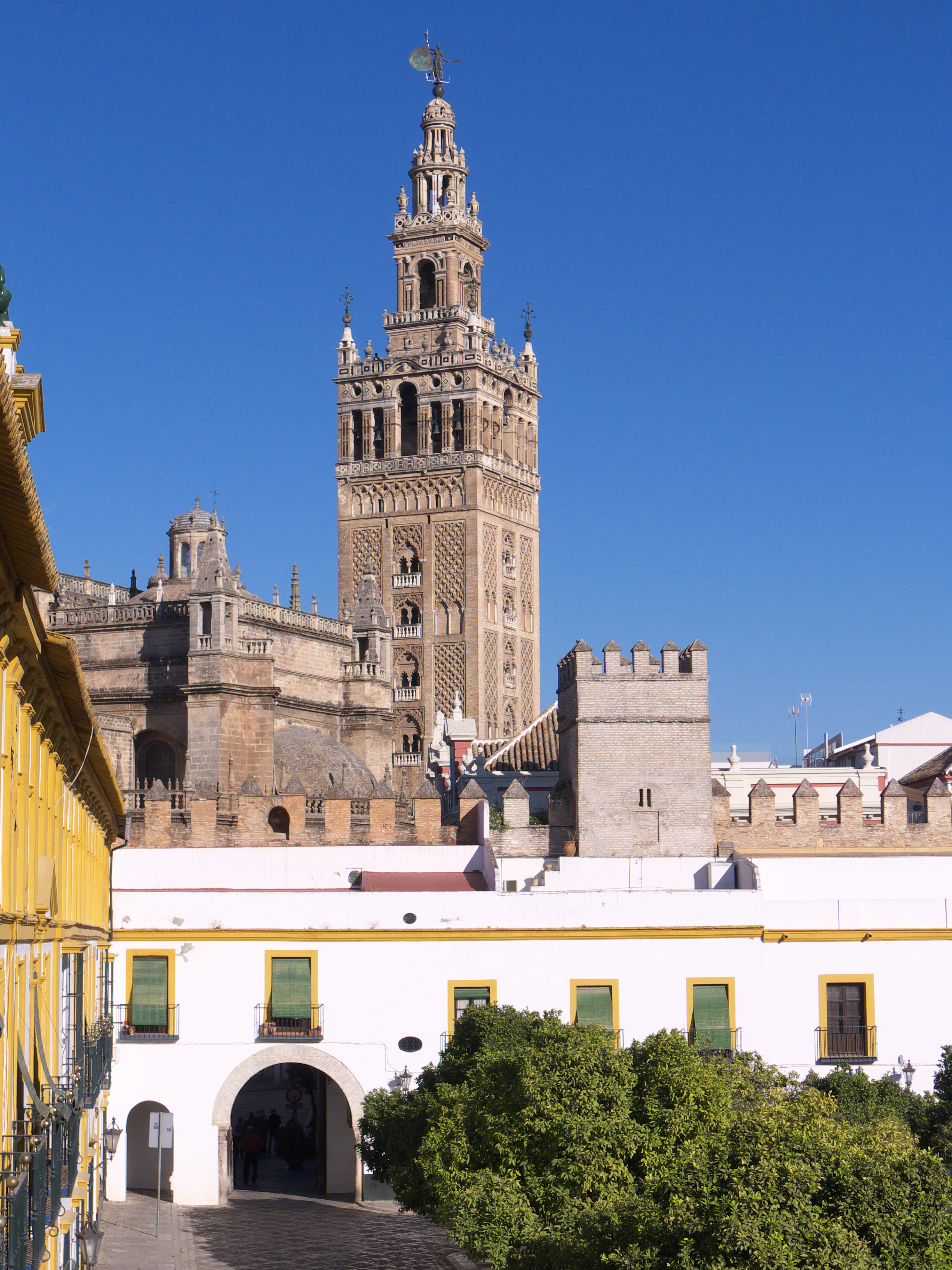 Al fondo, la Giralda.